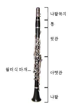 클라리넷 구조 (우리말로 옮기면서 그림 약간 수정했슴다.)